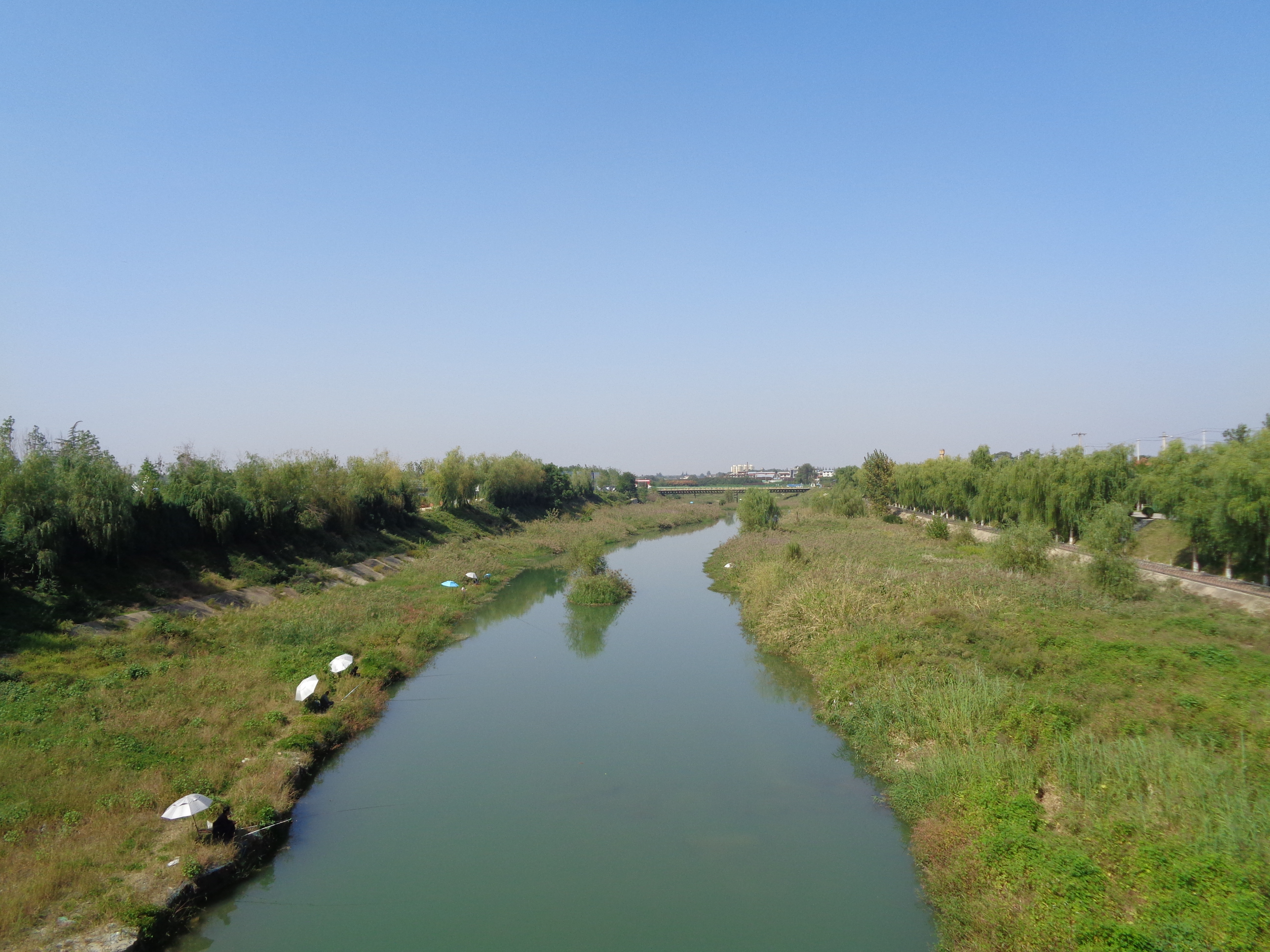 西安市鄠邑区在渼陂湖公园旁的涝河